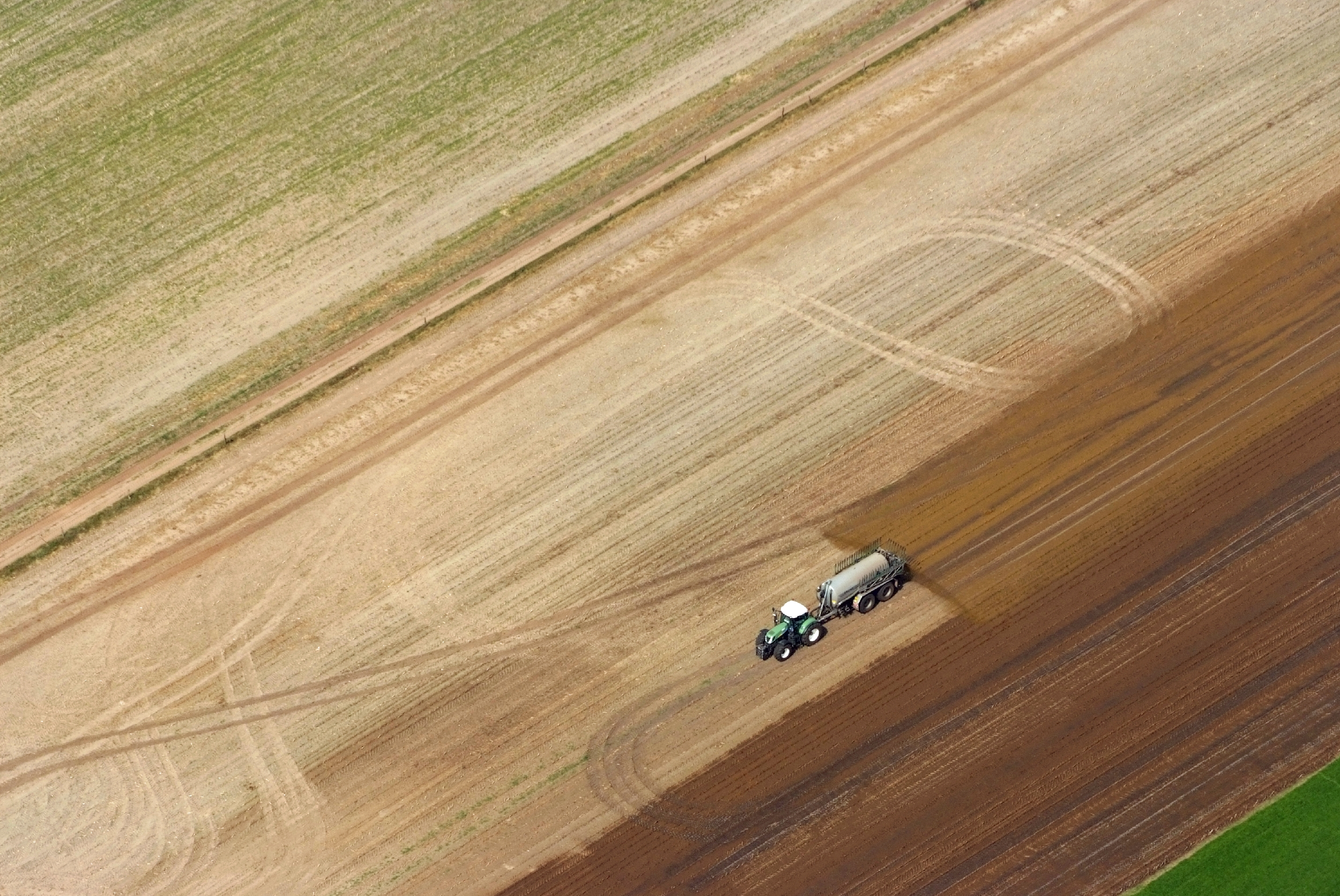 Fotoflug von Nordholz-Spieka nach Oldenburg und Papenburg